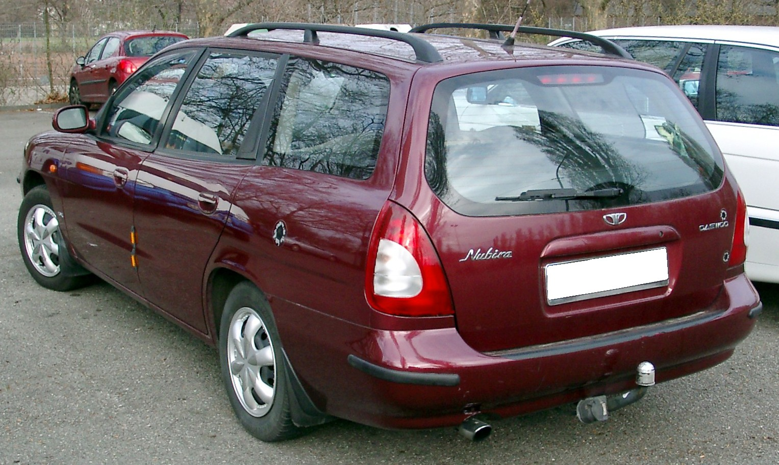 Daewoo Nubira Wagon